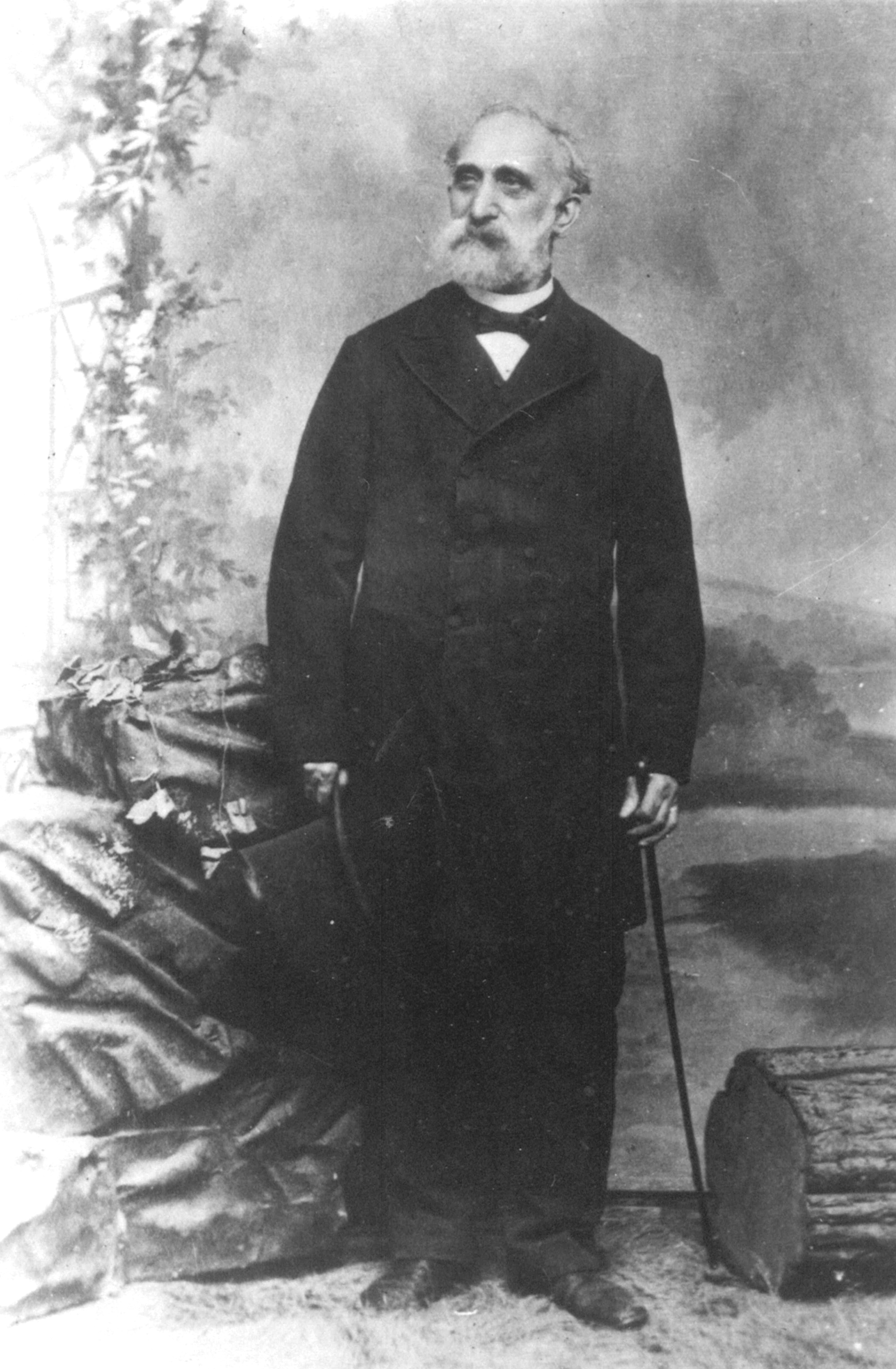 Heinrich Göbel / Henry Goebel in der Kulisse eines New Yorker Fotografen